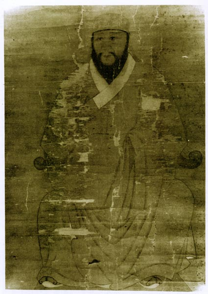 王铎（1592年－1652年），字觉斯，一字觉之。号嵩樵，孟津（今河南孟津）人，中国明末清初官员，书画家。